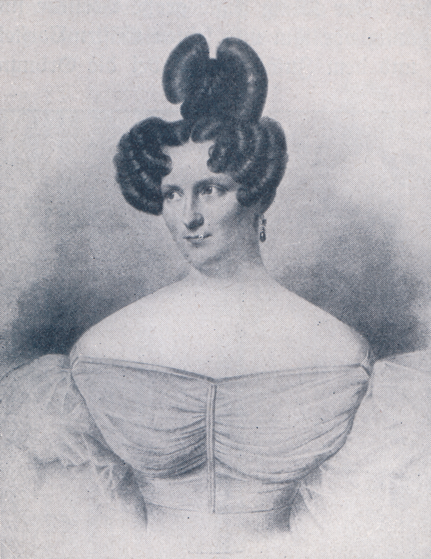 Rudolph Hertzog, Agenda 1914. Jahreskalender des Berliner Kaufhauses. Wilhelmine Unzelmann (Seitenausschnitt).